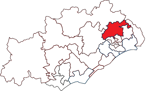 Situation du canton dans le département de l'Hérault